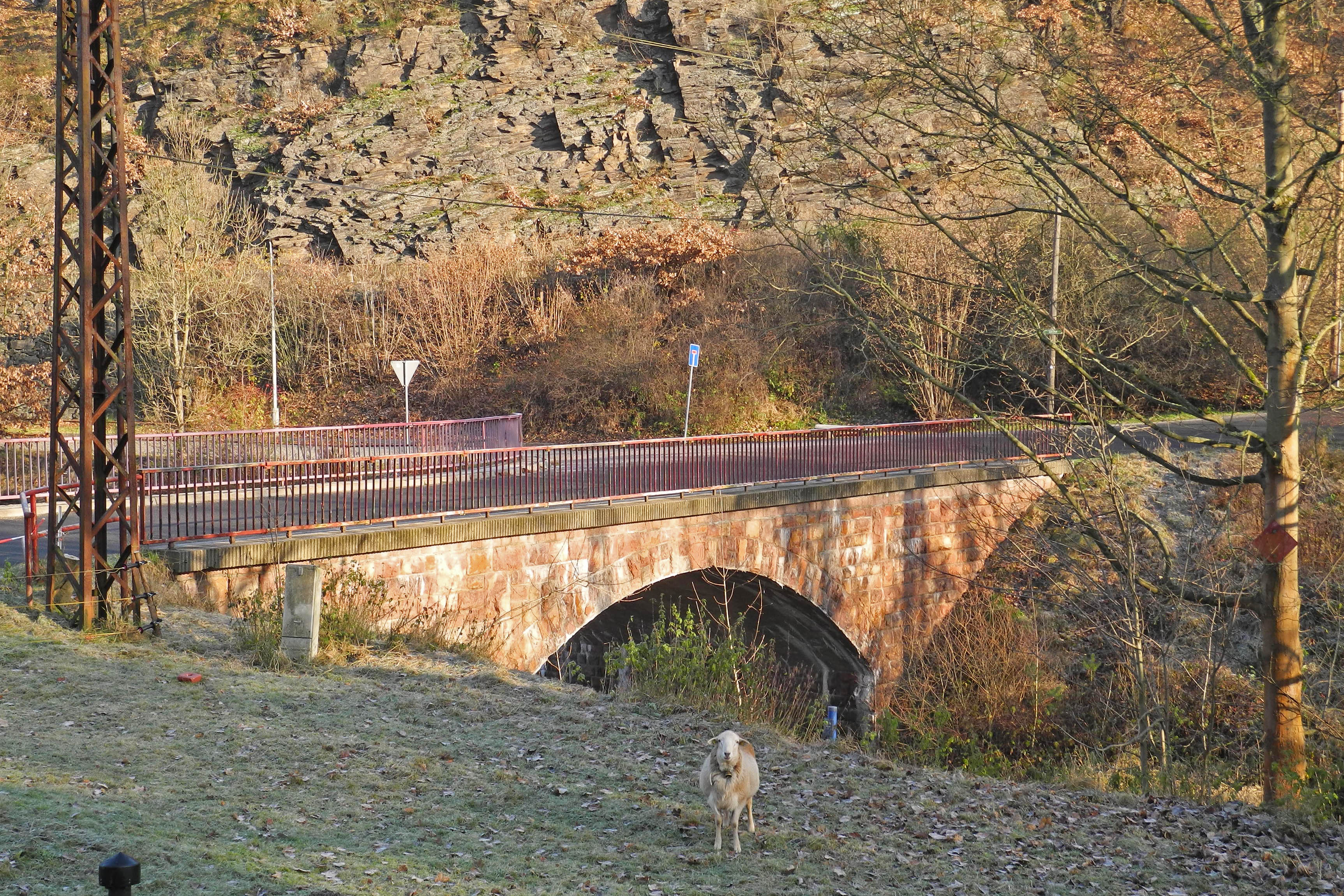 Straßenbrücke Bergstr. in Seifersdorf, OT von Dippoldiswalde